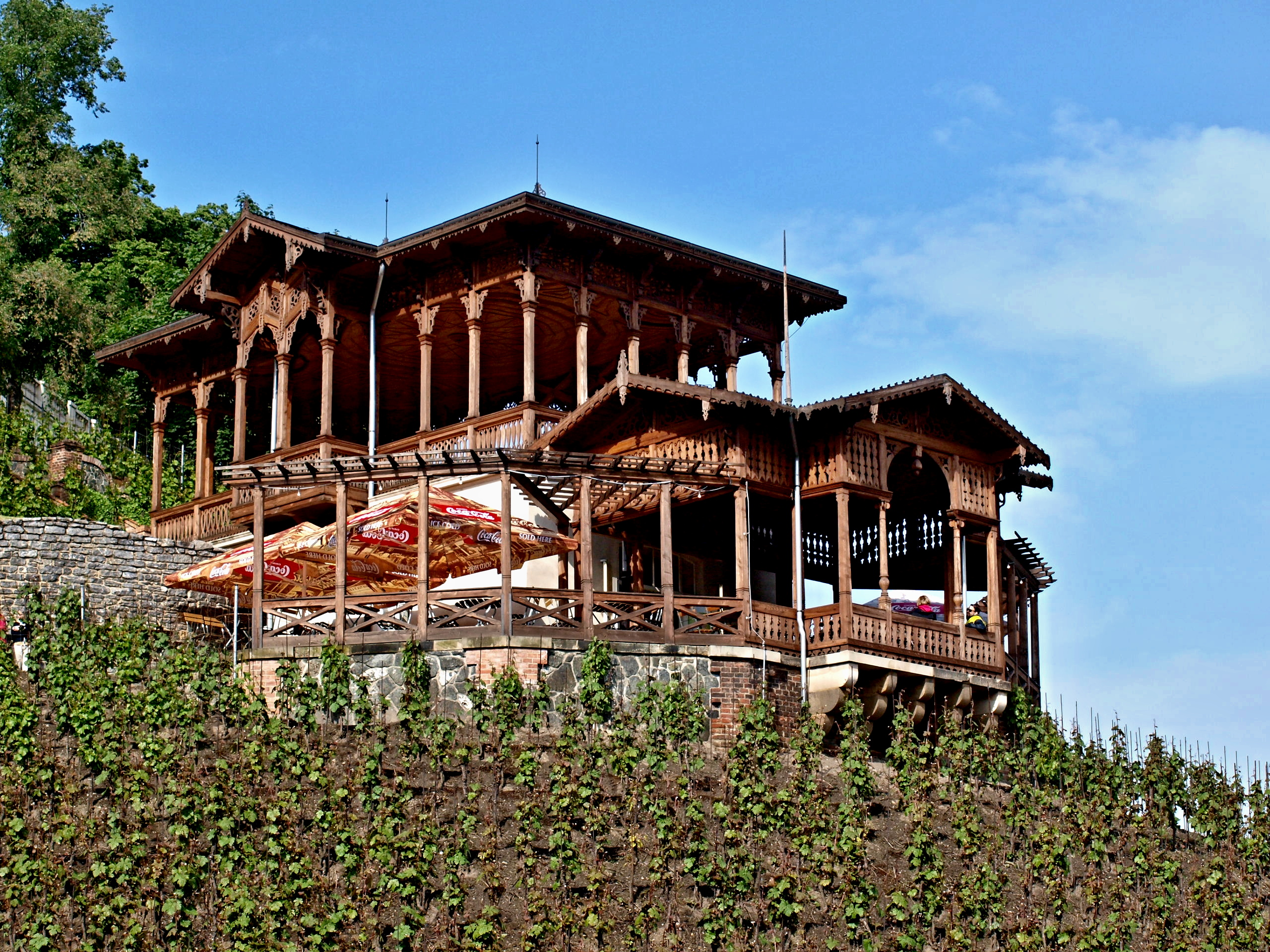 Viniční altán v Gröbovce